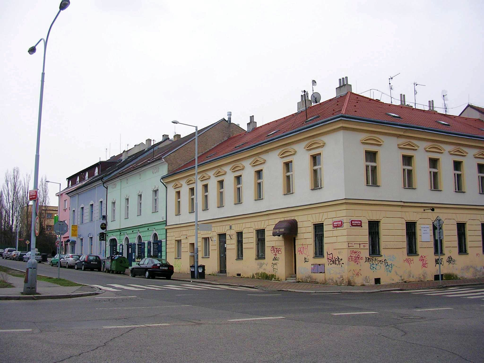 Česky: Praha, Strašnice: roh Dubečské a Kolovratské ulice. - OpenStreetMap(Info)